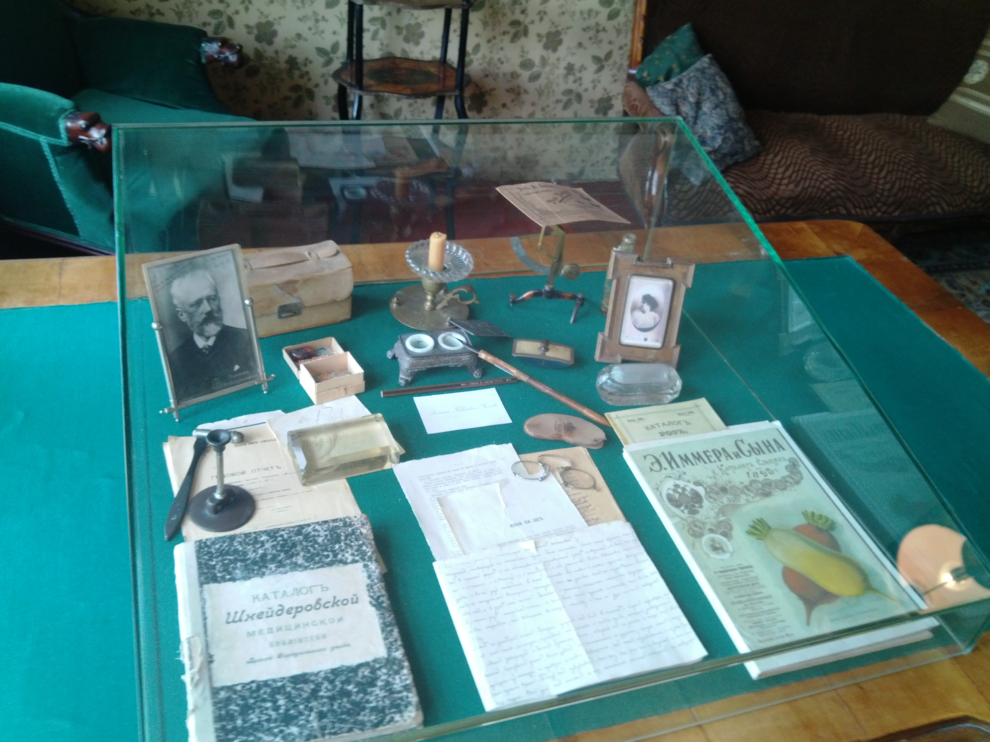 Дом А. П. Чехова, в котором он жил в 1892-1898 гг (мемориальный музей) (Москва и Московская область, Чехов, село Мелихово)